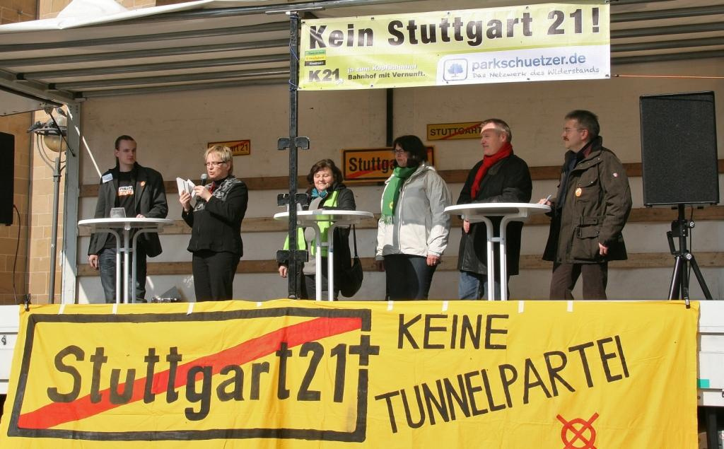 v.l.n.r.: Tobias Stöckl (PIRATEN), Silke Ortwein (Moderation), Elke Ehinger (Linke), Annerose Wolf (Grüne), Rainer Hinderer (SPD), Klaus Ries-Müller (ödp)